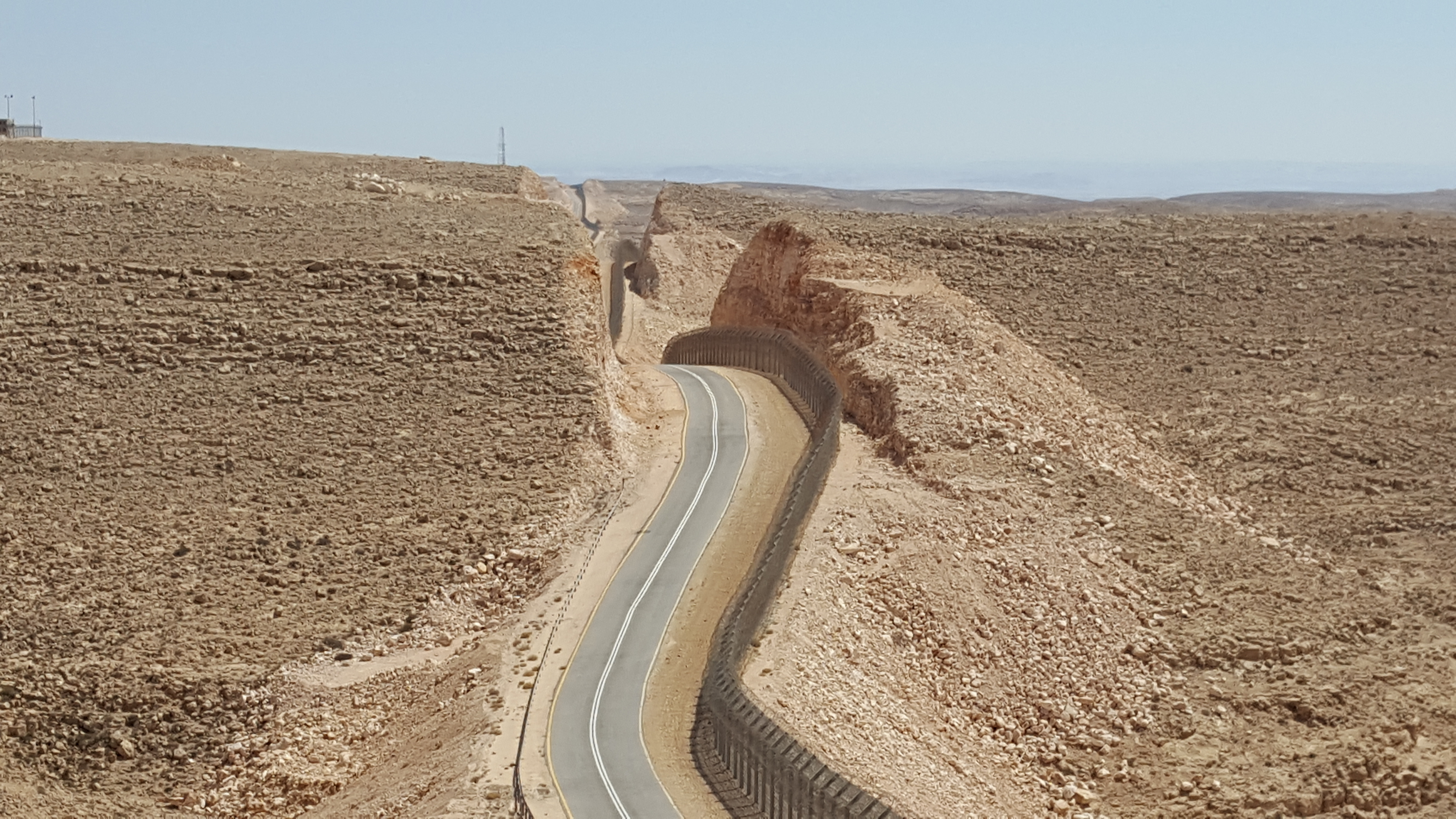 תוואי גדר המערכת בגבול מצרים והתרשמות מעבודות העפר המסיביות שנדרשו לבנייה